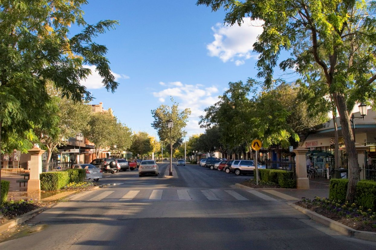 Dubbo, NSW